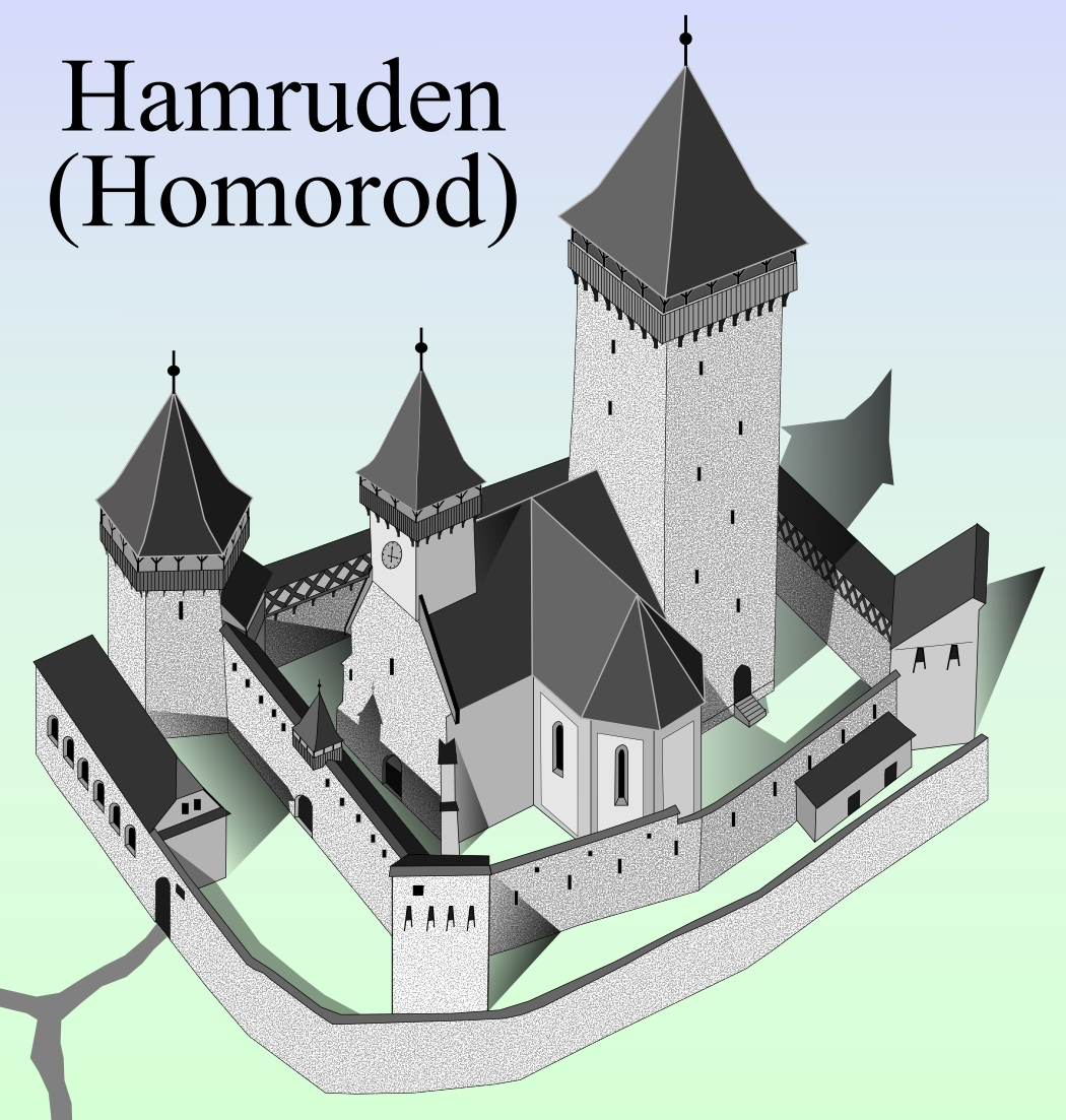 Biserica fortificata din Homorod